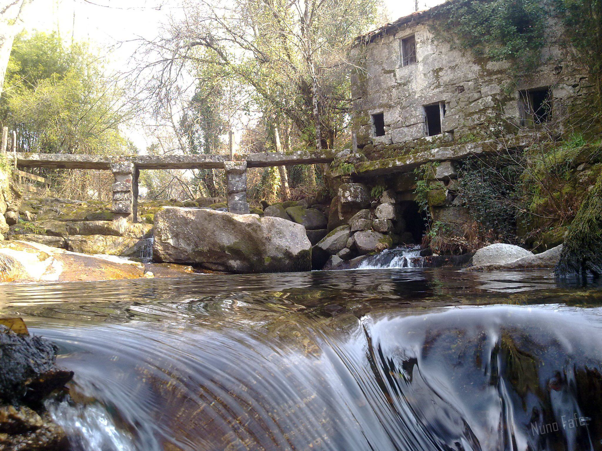 Antigo moinho no lugar dos moinhos na Freguesia de Travassós Fafe